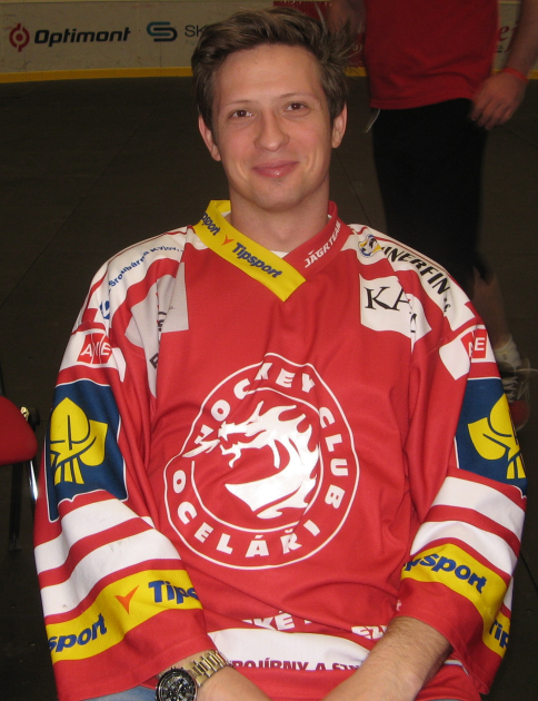 Po zakončení sezóny 2014/15 ve Werk Areně